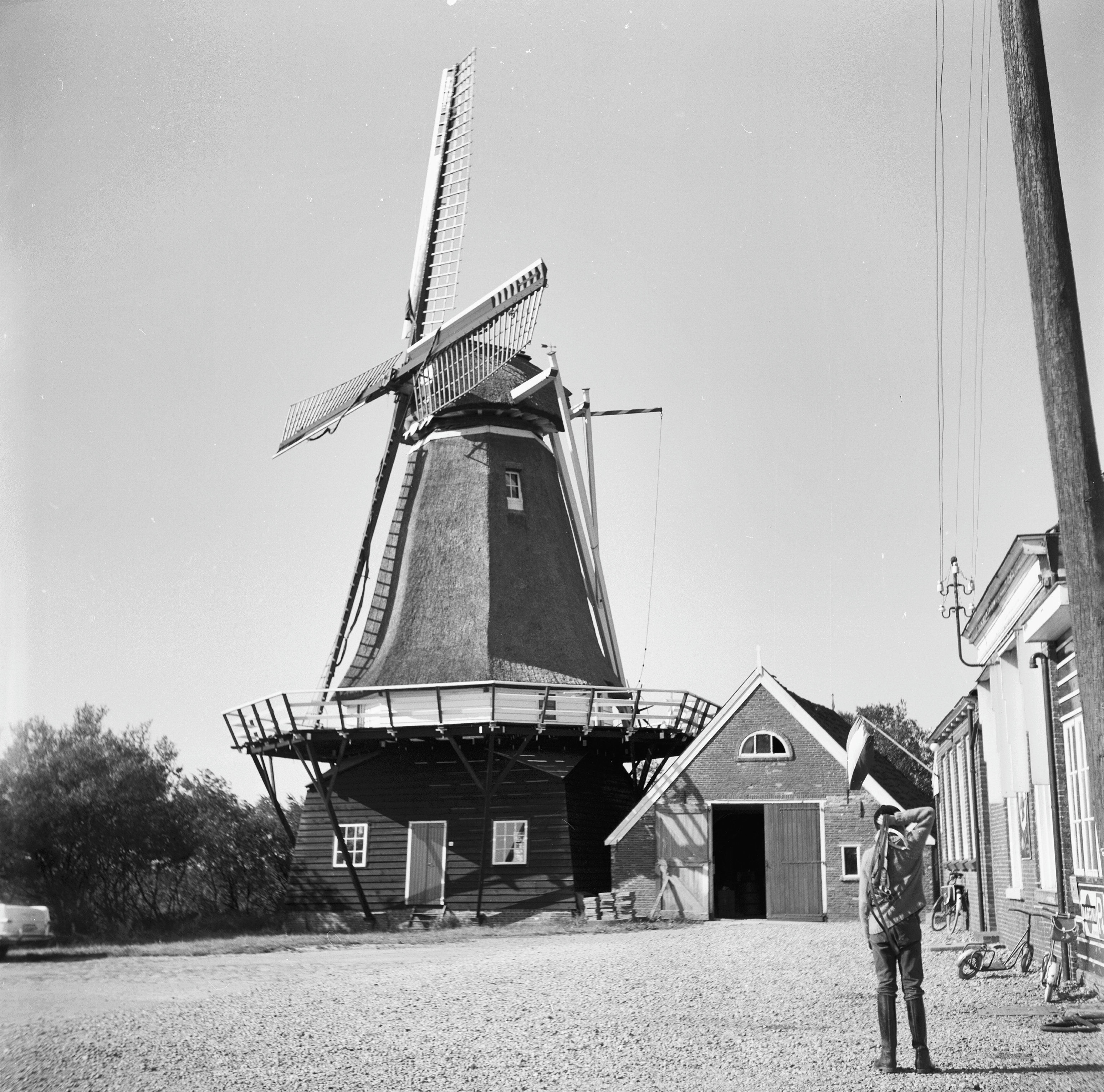 Vrouwbuurstermolen, aanzicht Middelweg 6